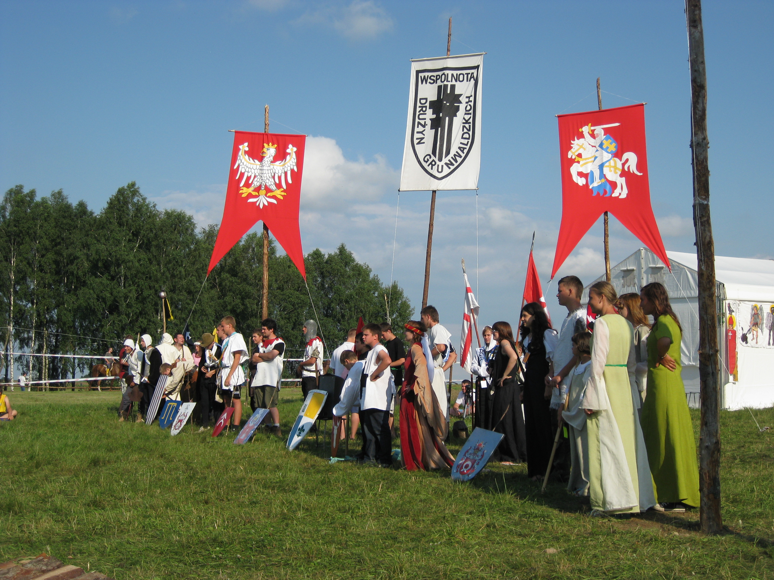 "Wspólnota Drużyn Grunwaldzkich" - XXXVIII Ogólnopolski Harcerski Zlot Grunwaldzki 2009